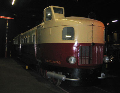 Micheline train photographed at Cité du train museum in Mulhouse, France.